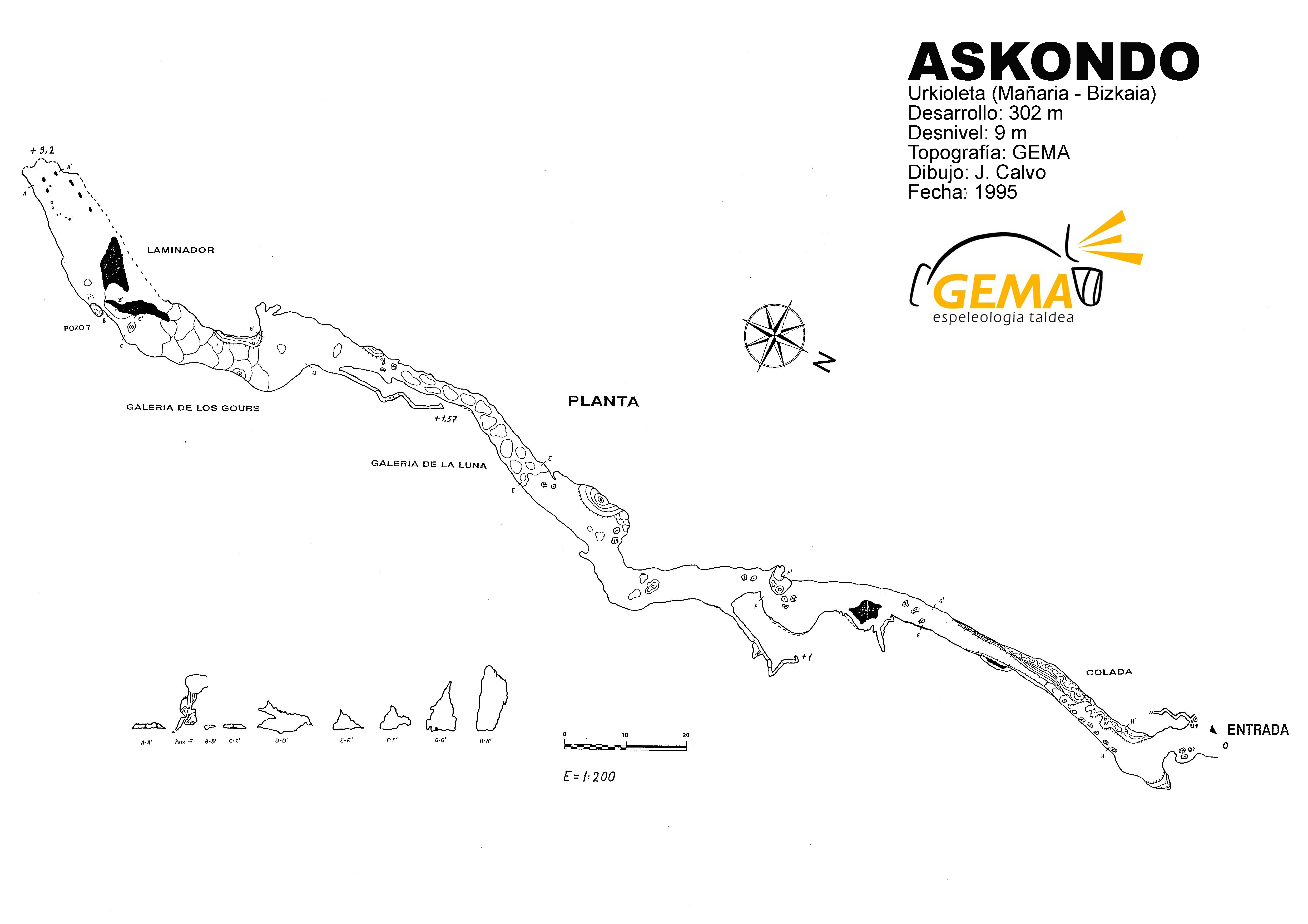 Askondoko kobaren topografia